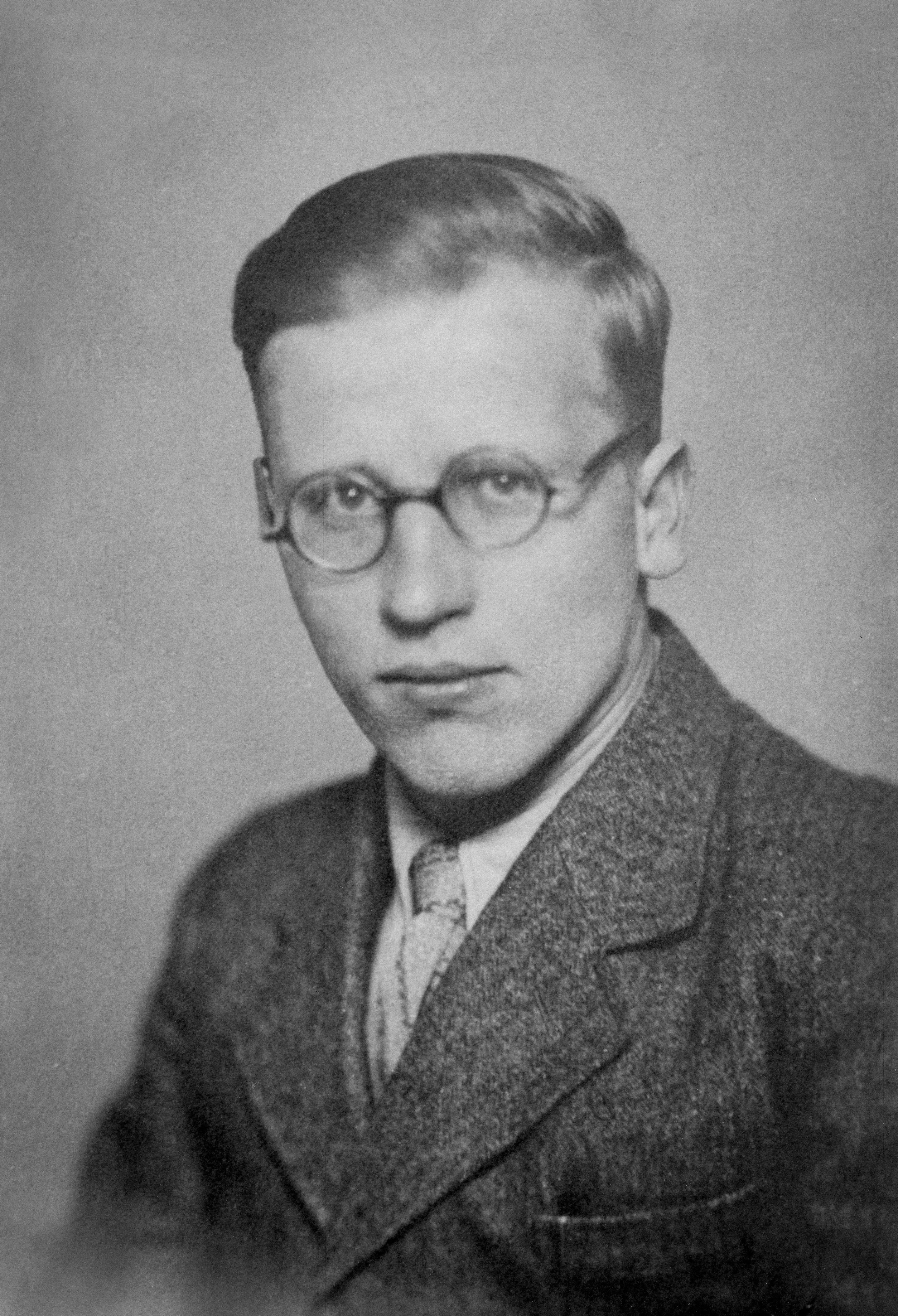 Karl Fischer, 16. November 1934; Originalfoto in Privatbesitz von Dnalor_01, Sohn Karl Fischers